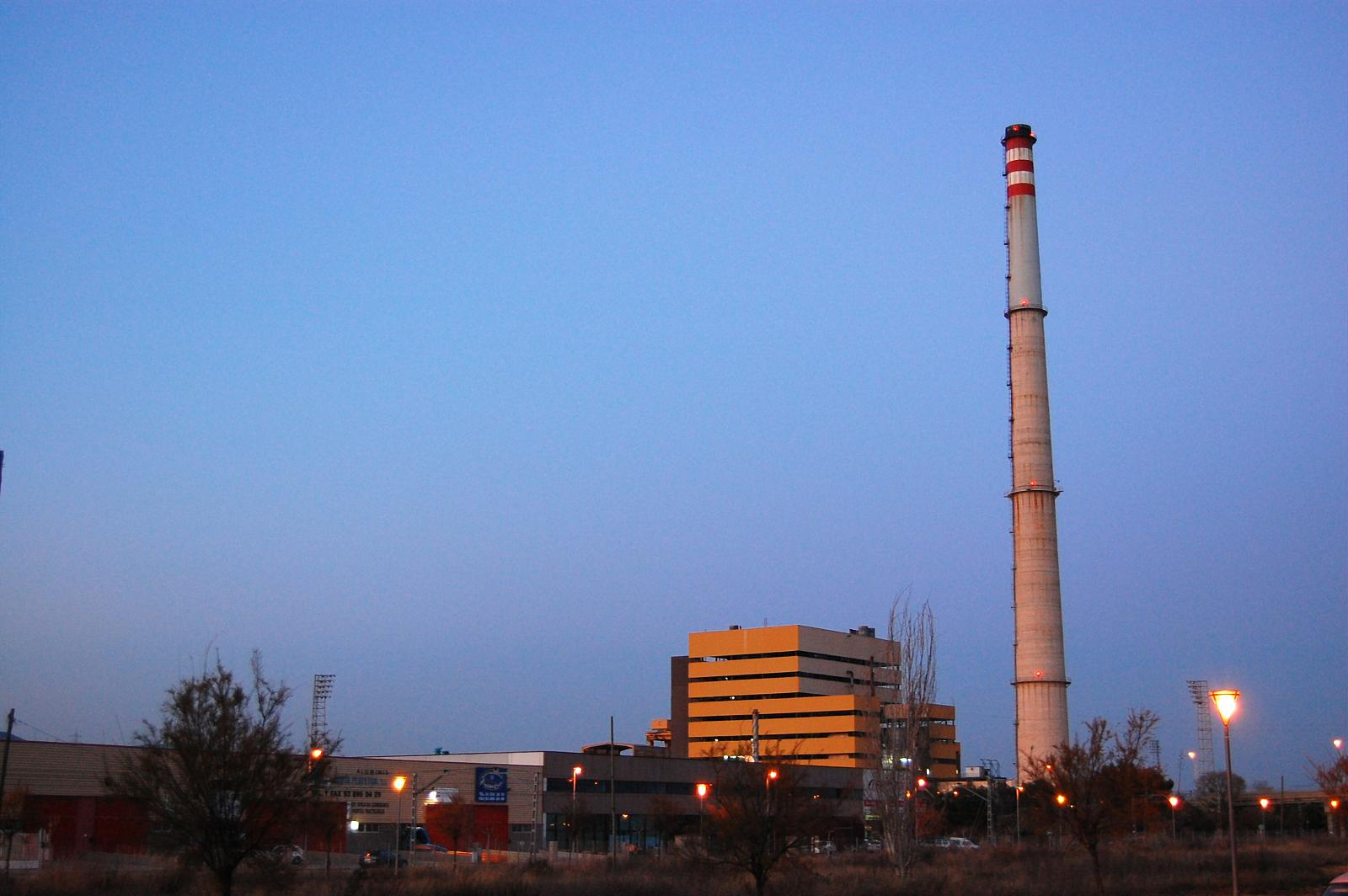 Vista de la central tèrmica de Cubelles al vespre